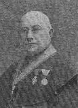 Theodor Wolf (1843 - 1906), Český římskokatolický kněz.